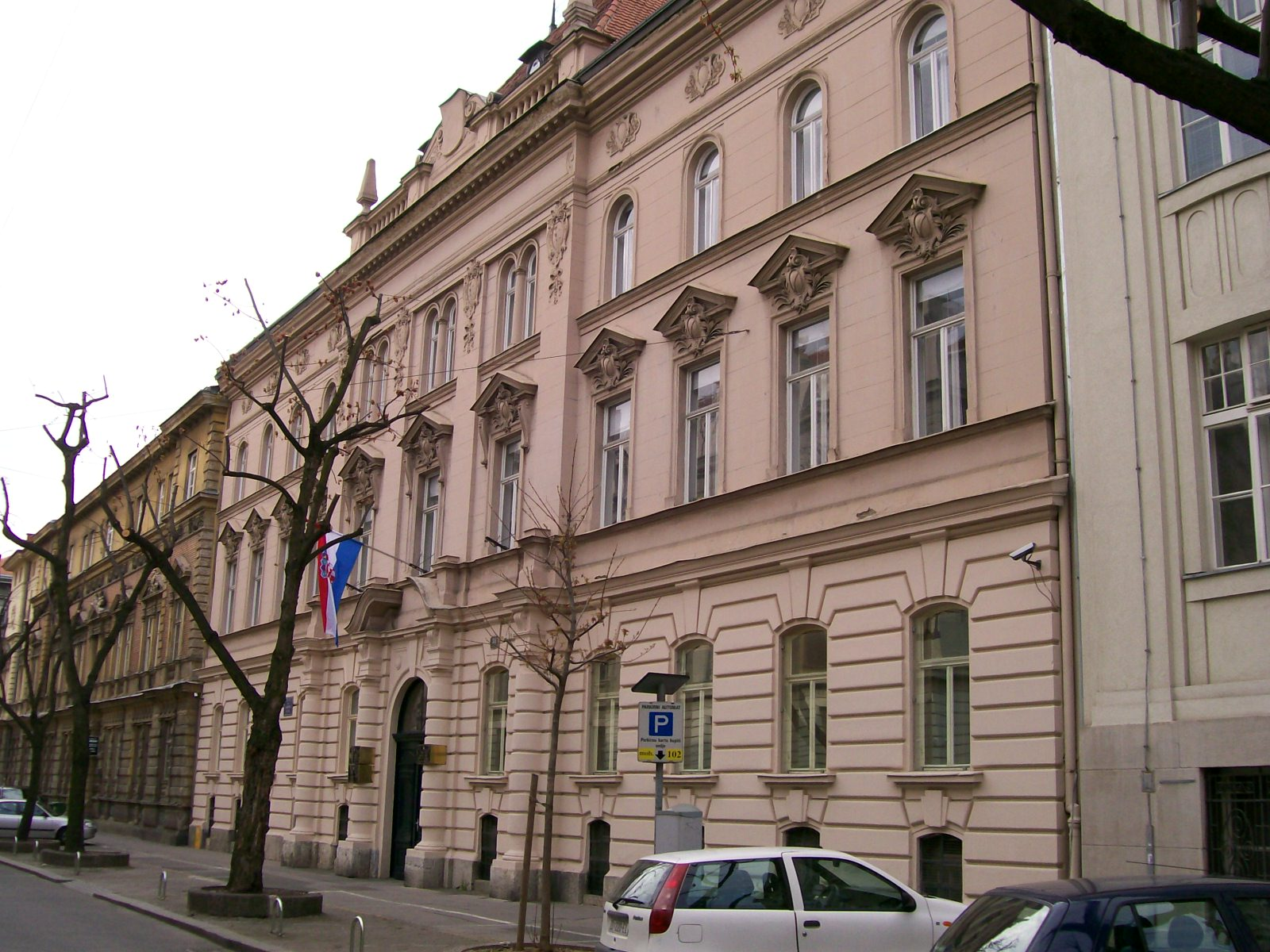 Zgrada Državnog odvjetništva Republike Hrvatske i USKOKa